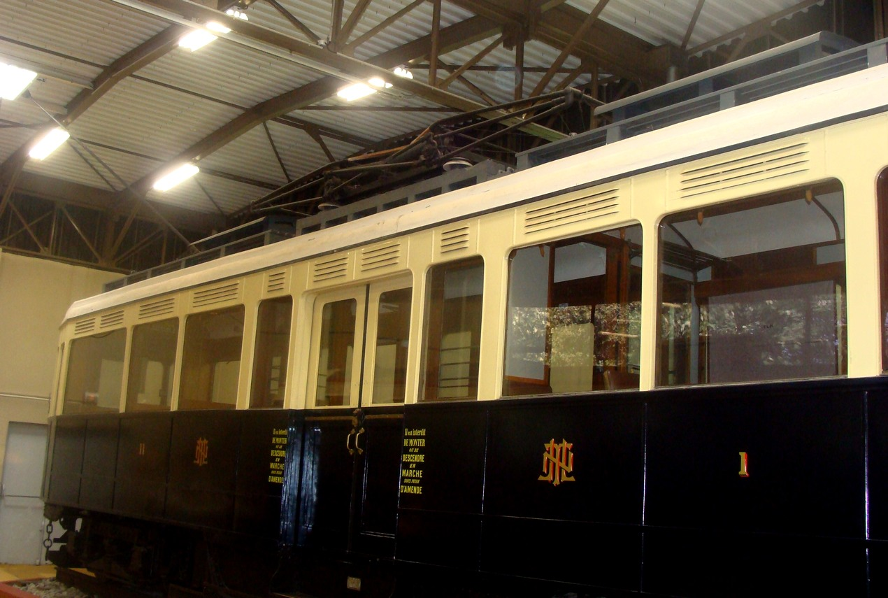 Vue latérale de la motrice n°6 du train bleu. Le pantographe est replié, la perche (à gauche) est libre. Noter le logo TLN, et l'affichage de deux classes (I et II), qui n'existaient pas en service normal.